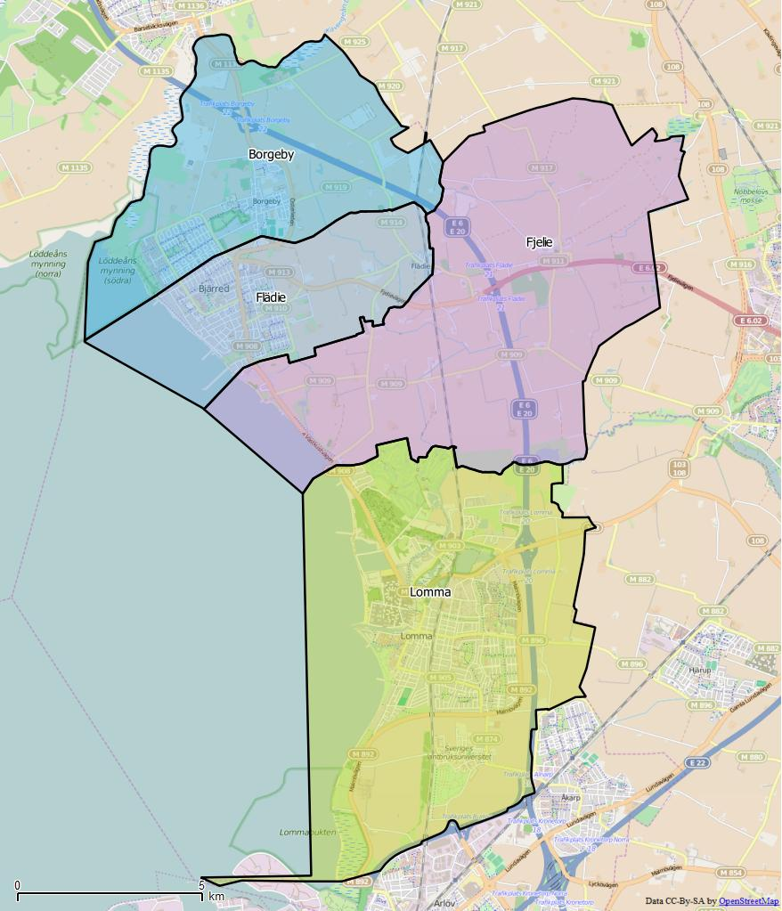 Distriktsindelningen i Lomma kommun World file: 24.13621615685835664 0 0 -24.13621615685835664 1443759.33859984413720667 7511104.2826006542891264